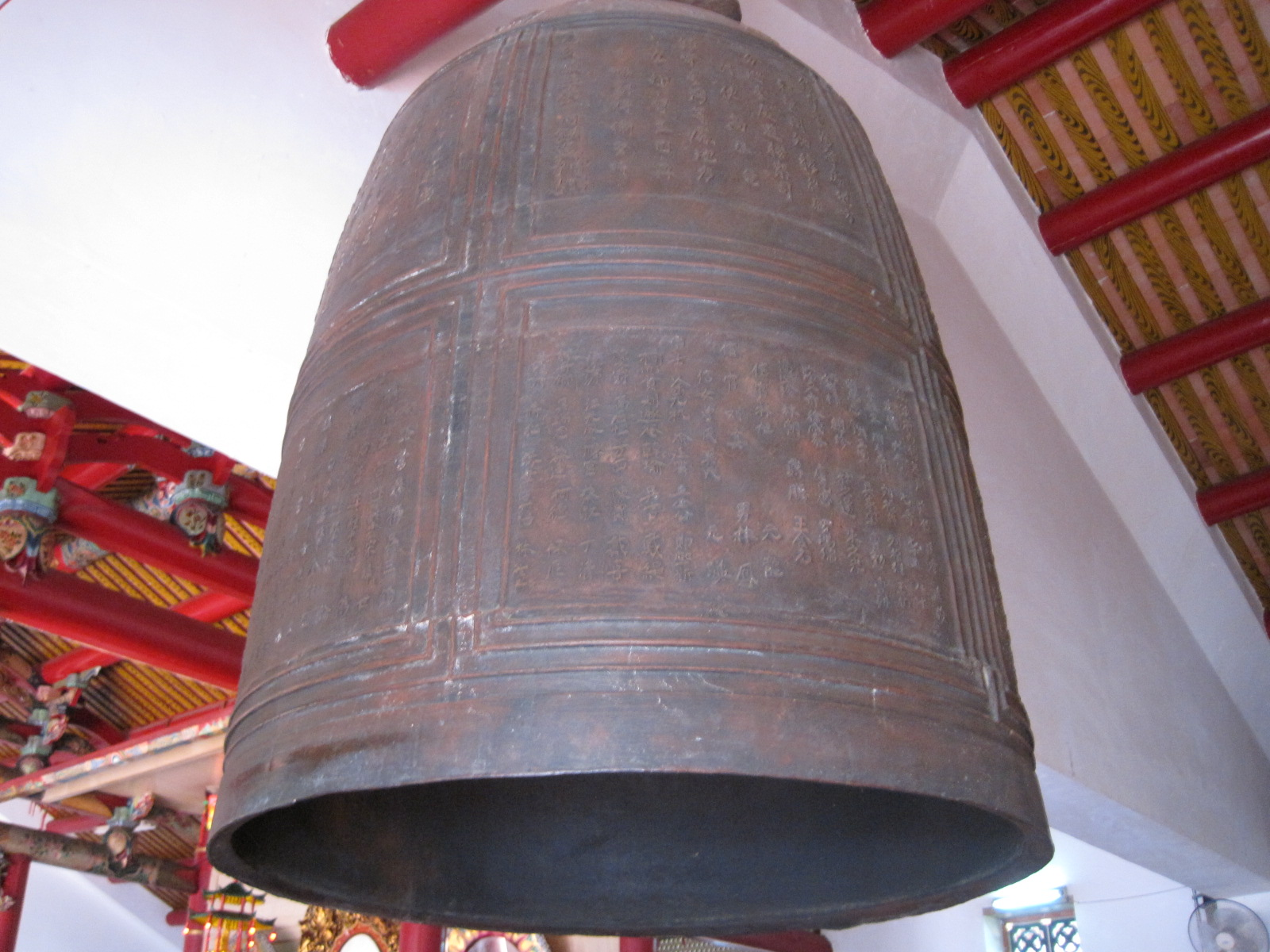 臺南開元寺古鐘。